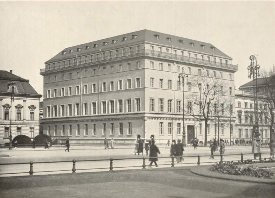 Geschäftsbebäude der Deutsche Länderbank AG, Berlin, Unter den Linden 78